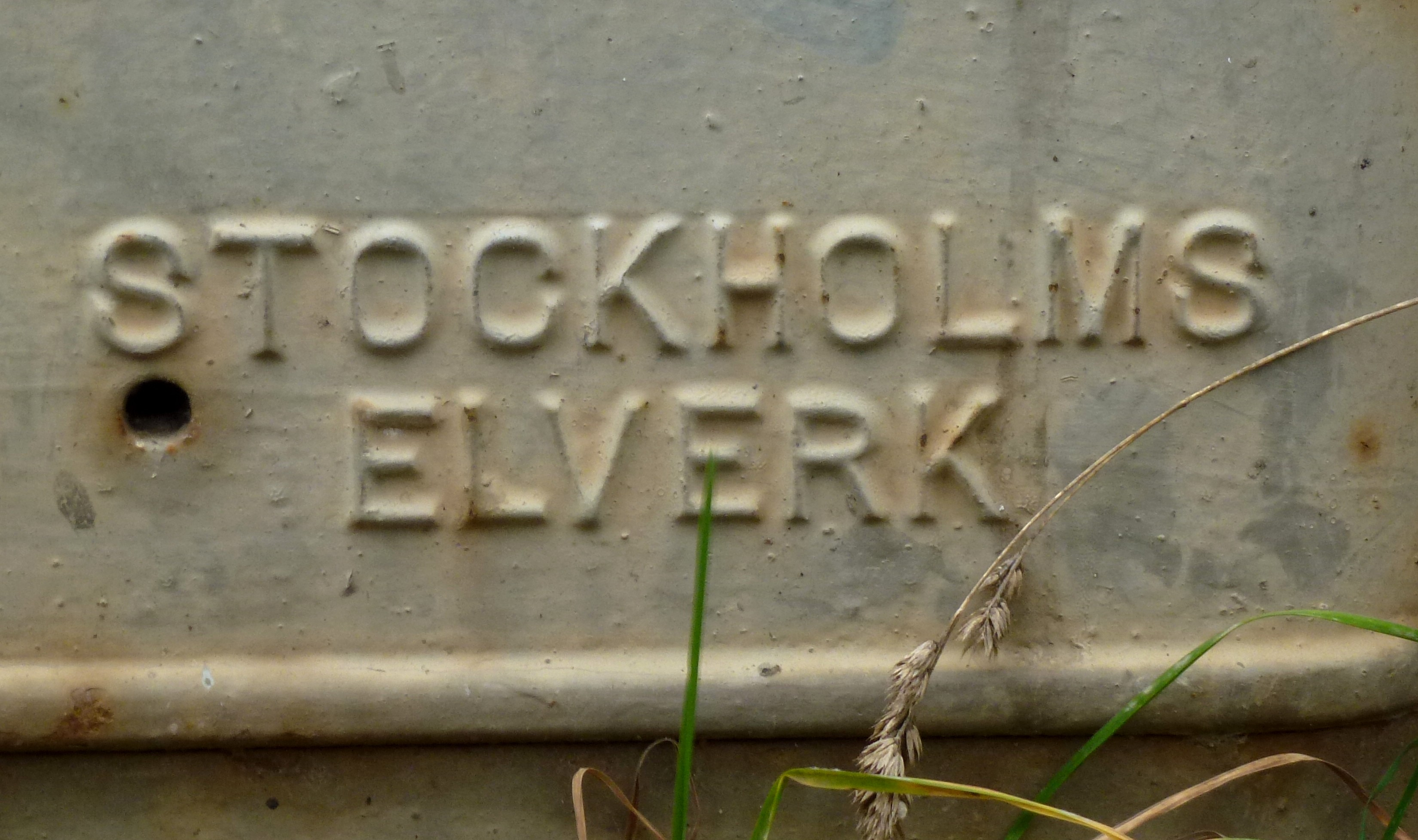 Stockholms Elverk, text på kabelskåp